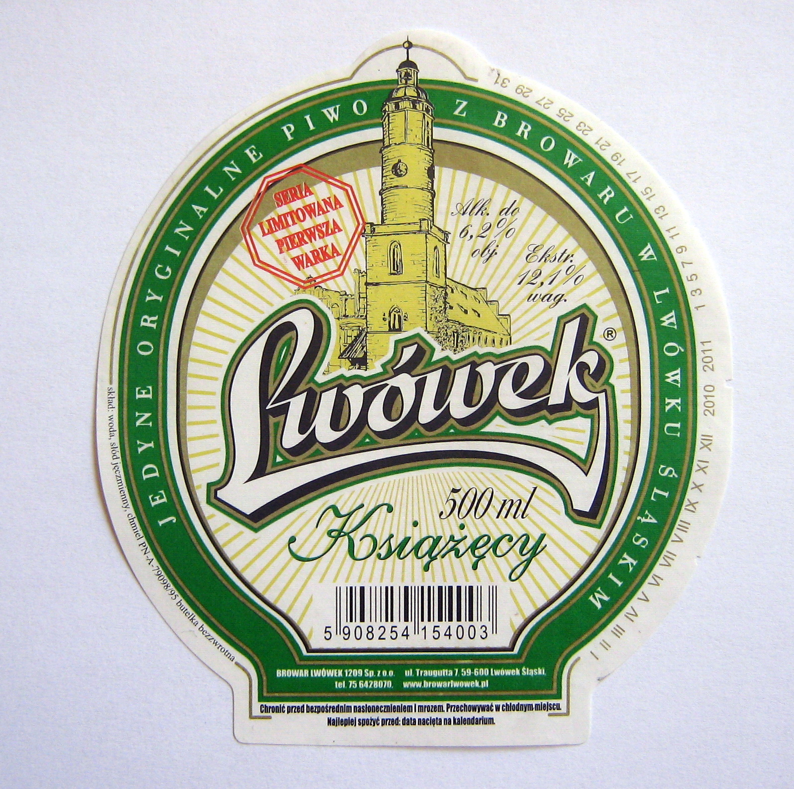 Etykieta Lwówka Książęcego z pierwszej warki, 2010 r.